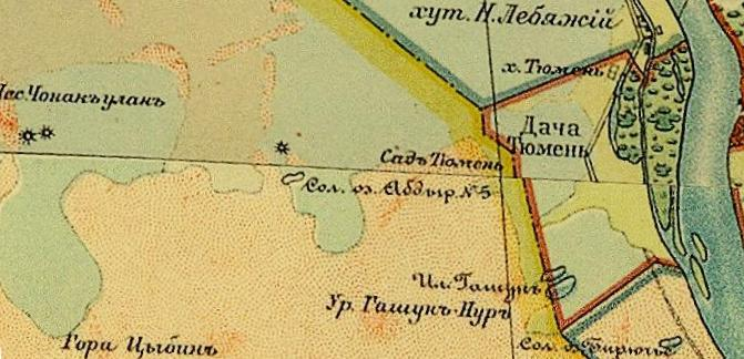 Топографическая карта Астраханской губернии пополненная современными съемками: железнодорожными, лесными и т.п. Масштаб 5 верст в дюйме, 1:210000